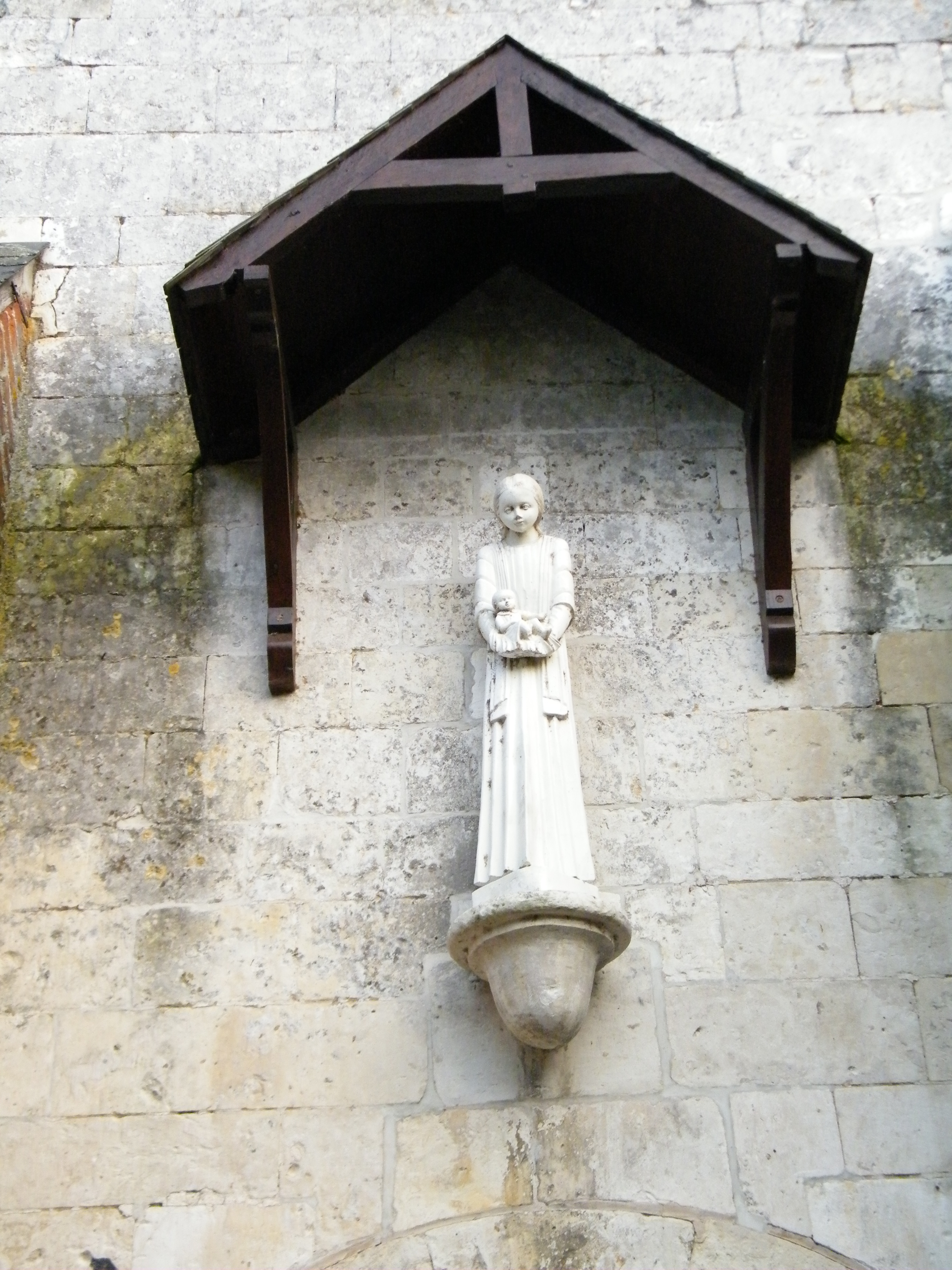 L'église, détail de la Vierge à l'enfant du portail.